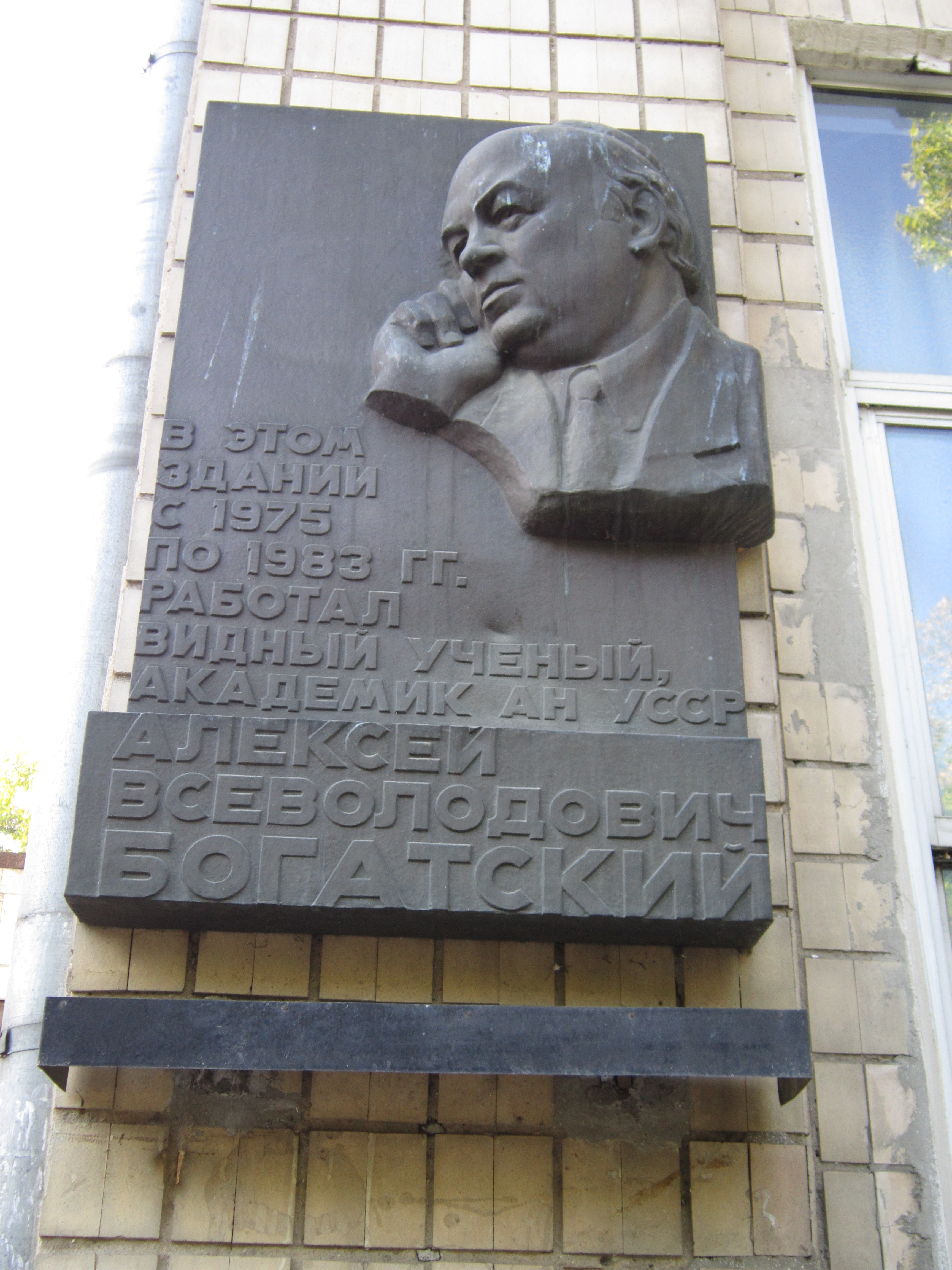 Будинок, в якому працювали: - у 1975-1983 рр. Богатський А.В.- академік АН УРСР; - у 1979-1986 рр. Полуектов М.С.- академік АН УРСР; - у 1933-1991 рр. Назаренко В.Л.- чл.-кор. АН України, Одеса, Люстдорфська дор., 86, НДІ АН України ім. О.В. Богатського